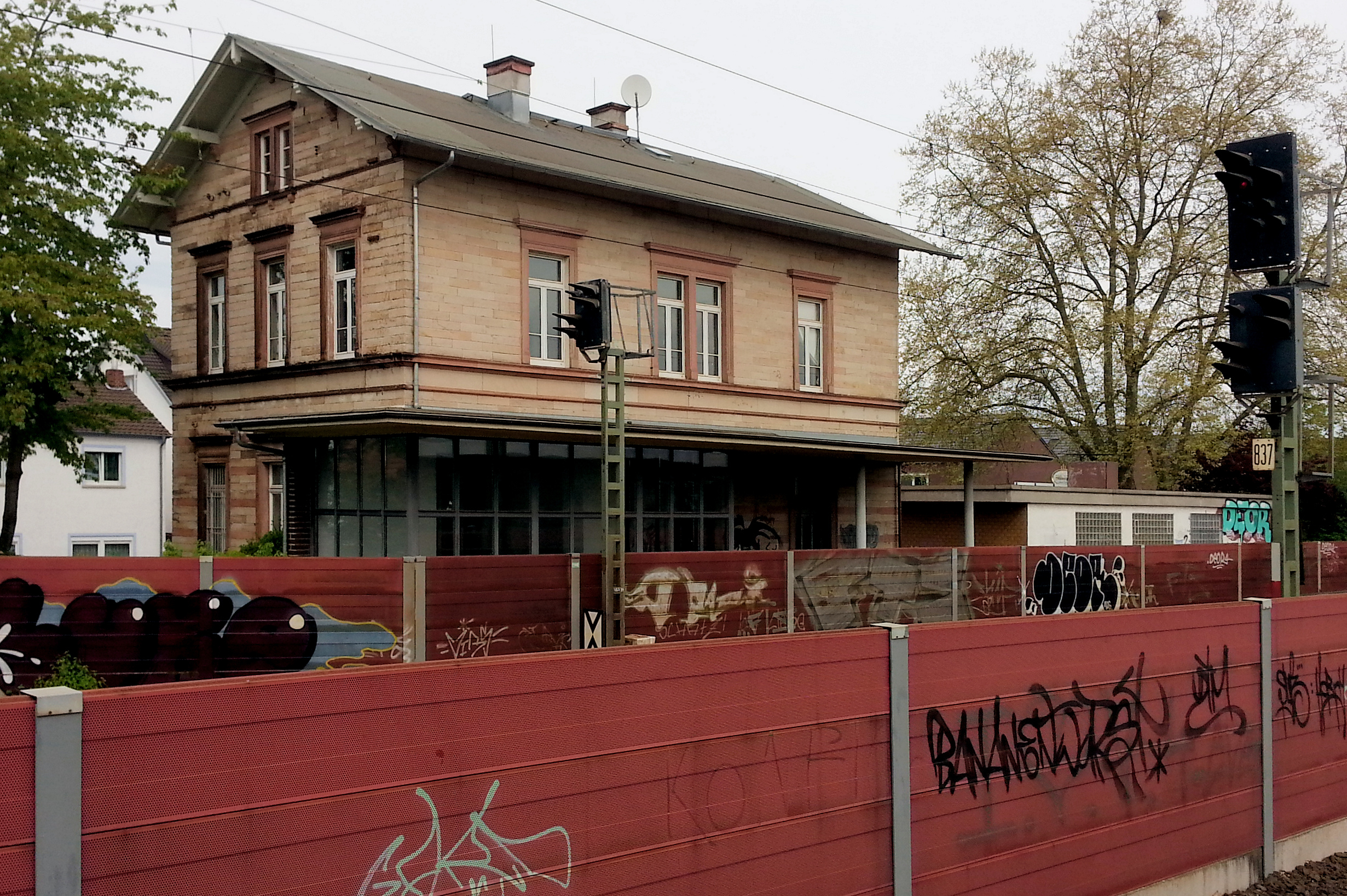 Bahnhof Darmstadt-Wixhausen (Ansicht von Süd-Osten)